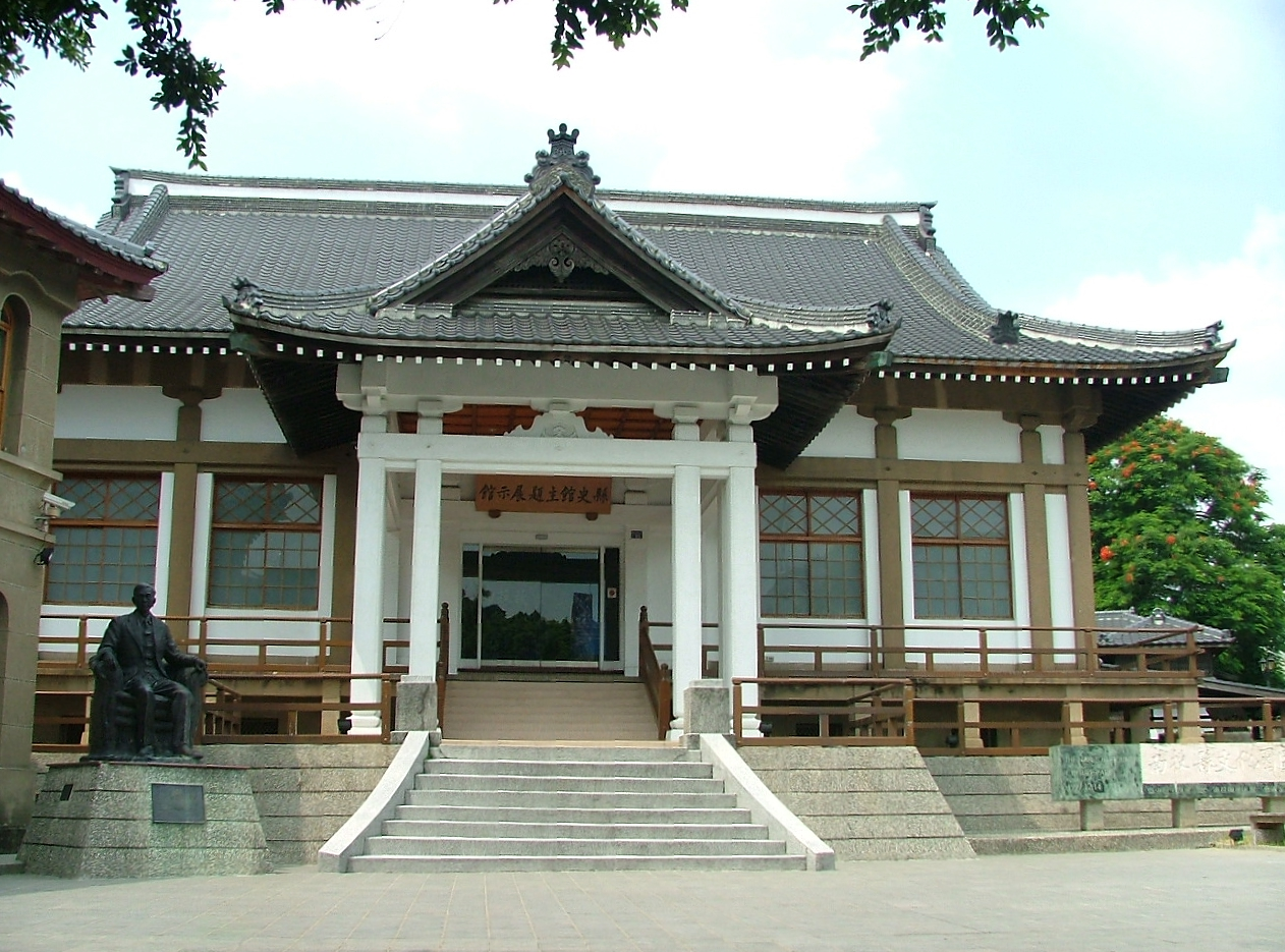 南投縣文化園區(南投縣縣史館)